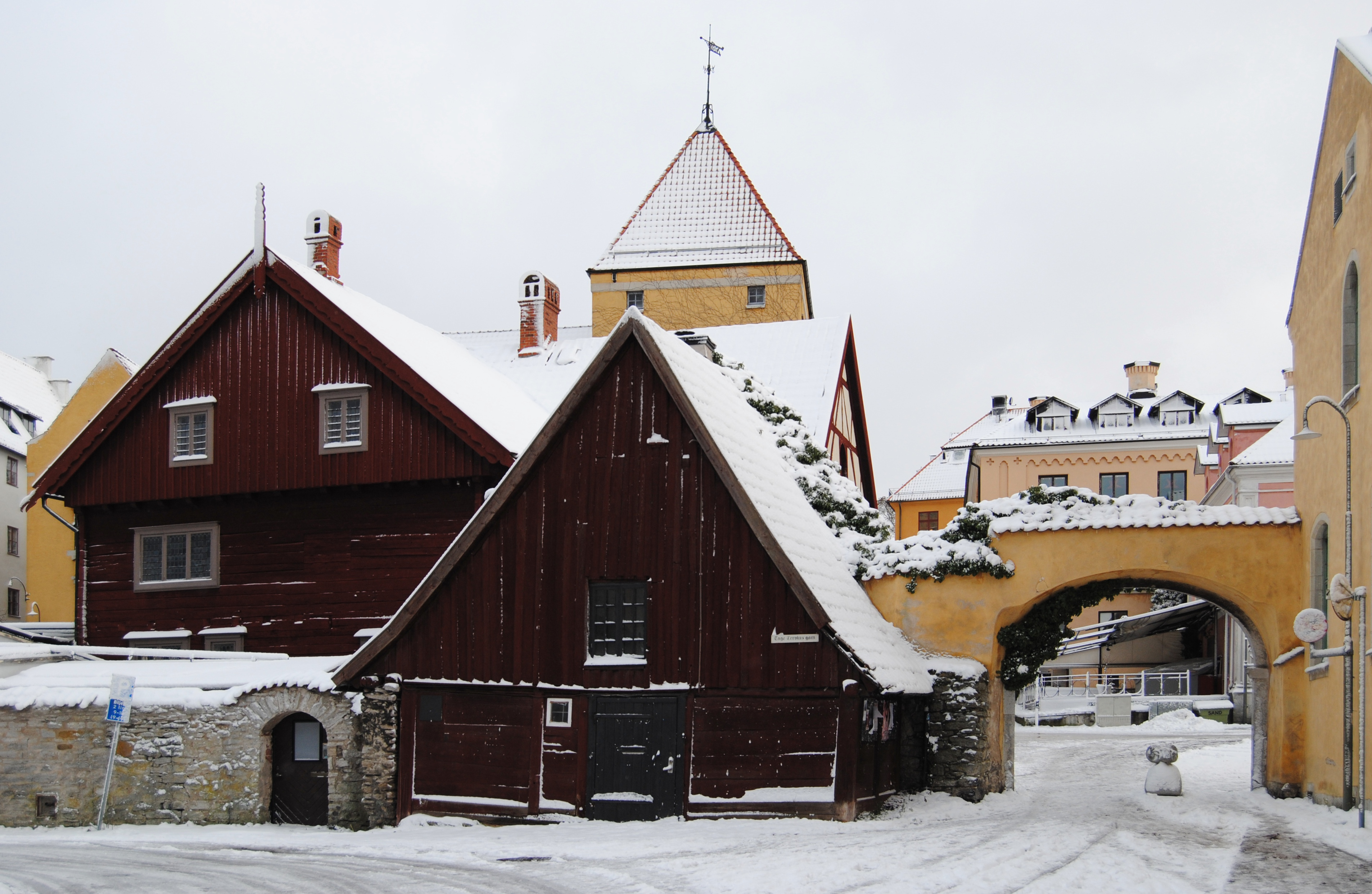 Byggnaden i förgrunden hör till fastigheten Burmeister 5 som ligger utanför stadsmuren utmed Tage Cervins gata i Visby (Gotland). Kvarteret har fått sitt namn efter den tyske handelsmannen Hans Burmeister som på 1600-talet uppförde det så kallade Burmeisterska huset (hör till fastigheten Burmeister 4) ch som syns på andra sidan ringmuren på fotografiet.